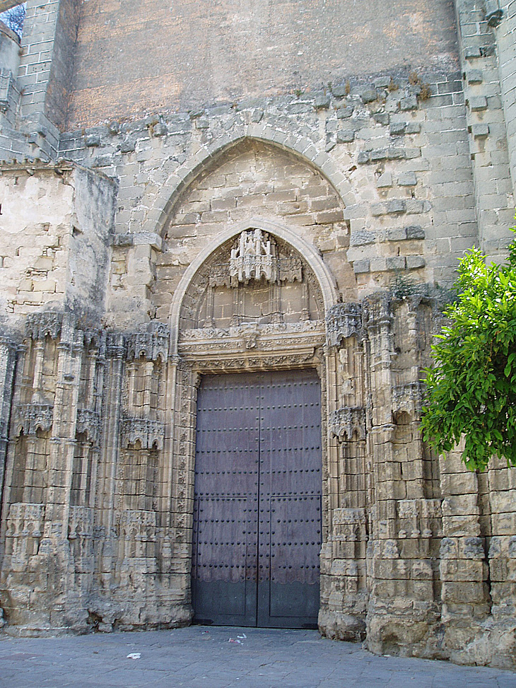 Portada del Perdón (gótica) de la Iglesia Mayor Prioral de El Puerto de Santa María, España.